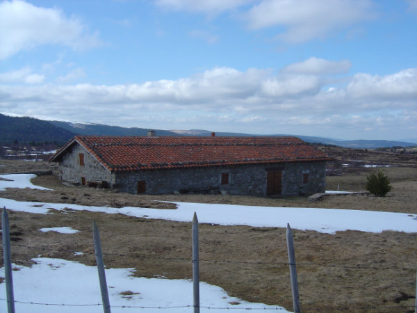 L'une des jasseries de Colleigne sur la commune de Sauvain